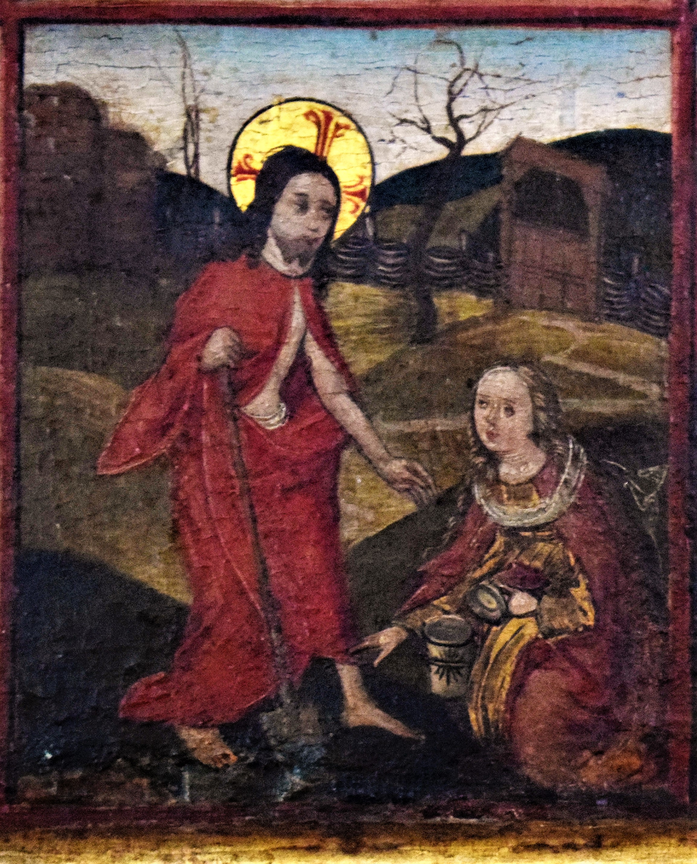 Rieterkirche Kalbensteinberg, Gemälde an der Langhaus-Nordwand, Tafelbild "Vita Mariae et Christi", die sogenannte „Bilderbibel“ (um 1480/90), Szene 47: Jesus erscheint Maria Magdalena